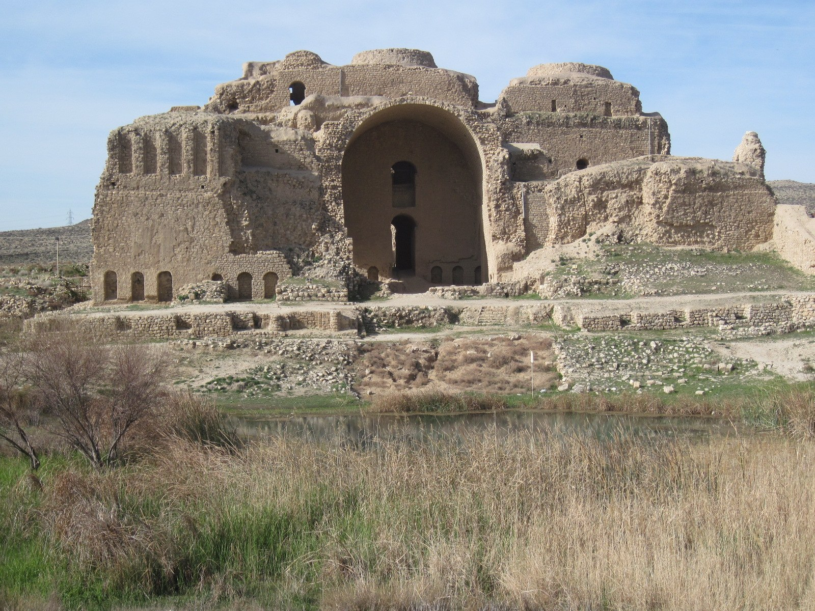 Развалины дворца Ардешира Бабакана, что в 2км на север от Фирузабада.